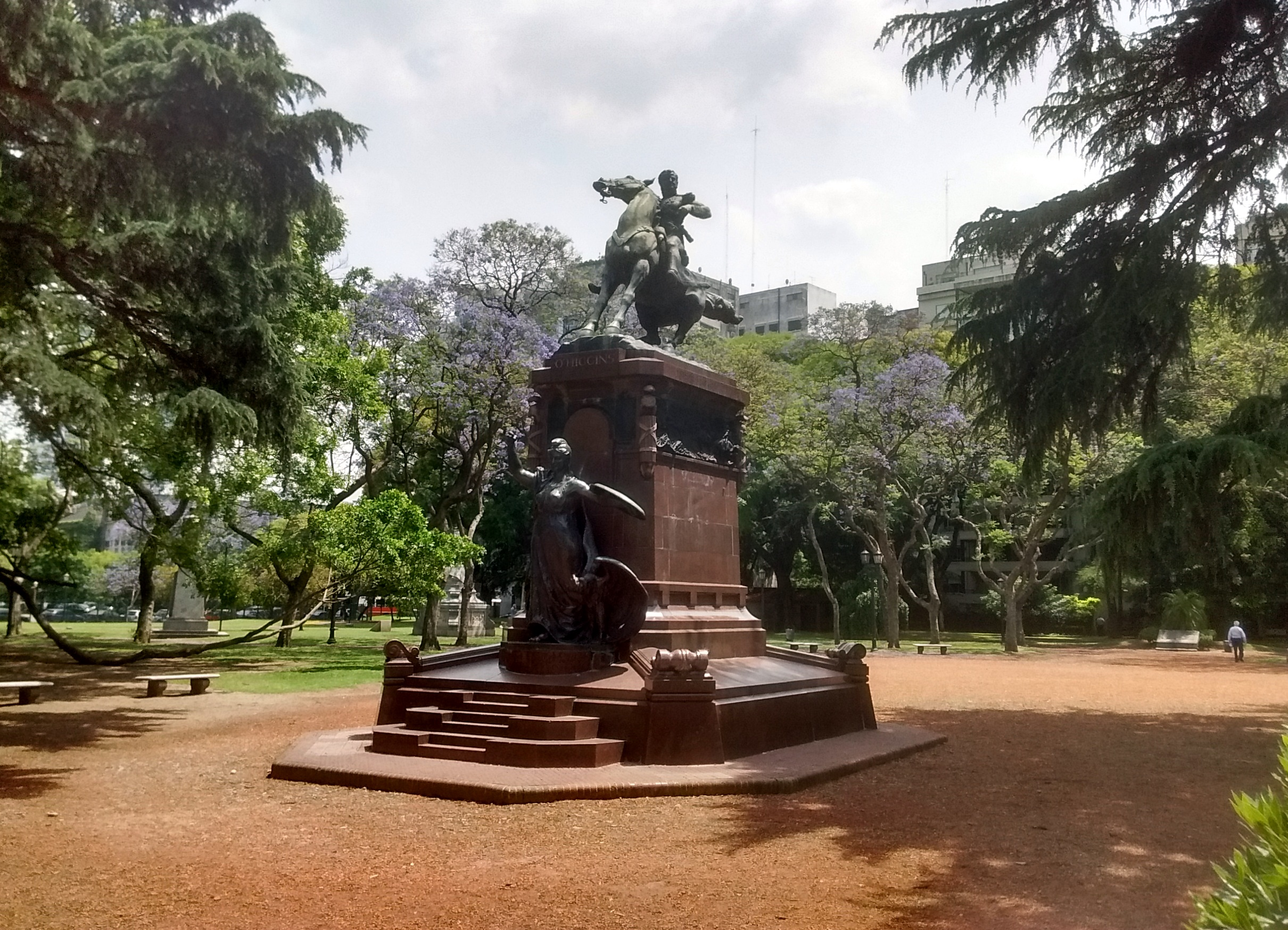 Monumento al Capitán General Bernardo O'Higgins Riquelme, en la Plaza República de Chile, en el barrio de Palermo, Buenos Aires, obra del escultor Guillermo Córdova.